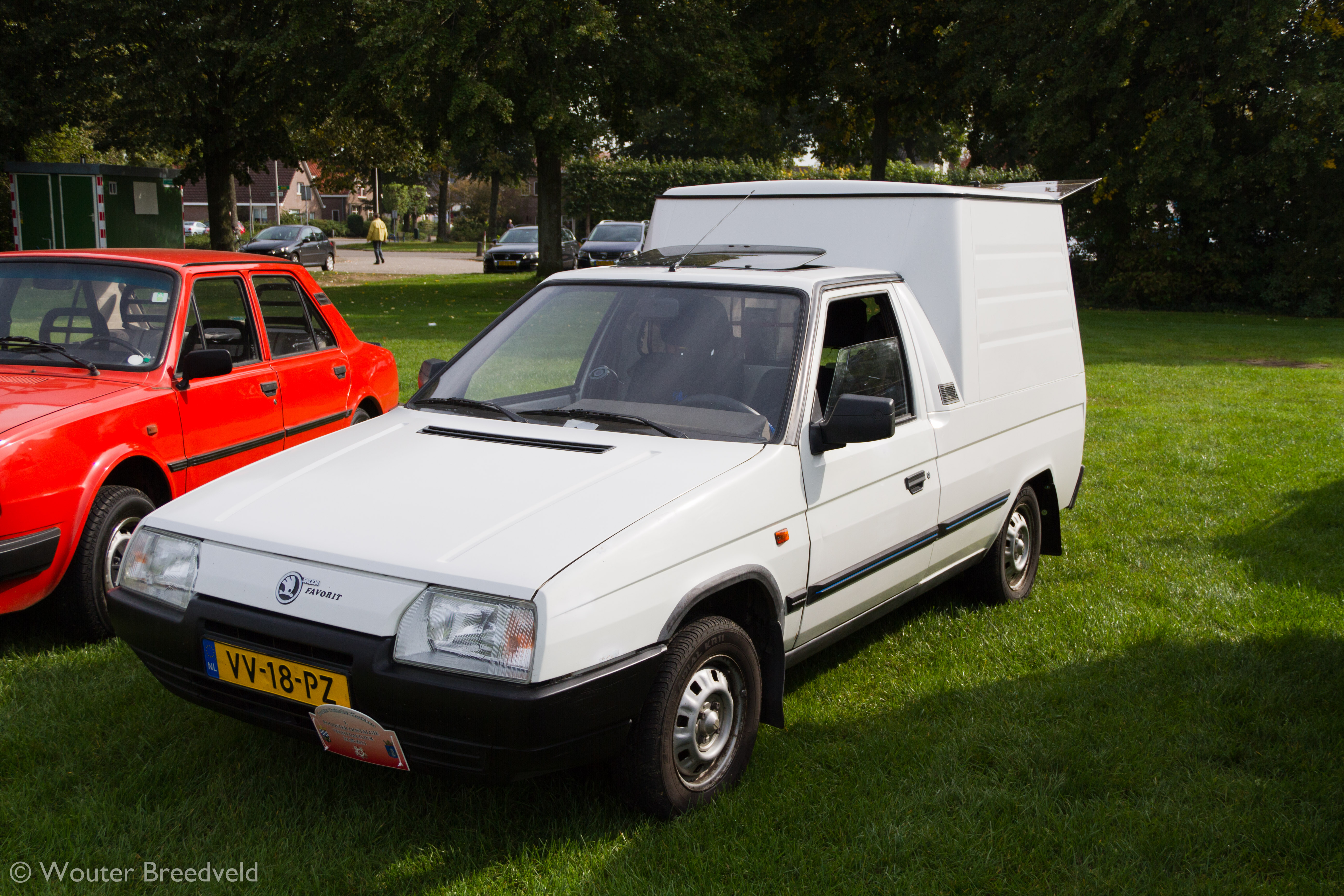 White Škoda Pick-up during Roodster Oostalgie Vechtdal Toertocht.